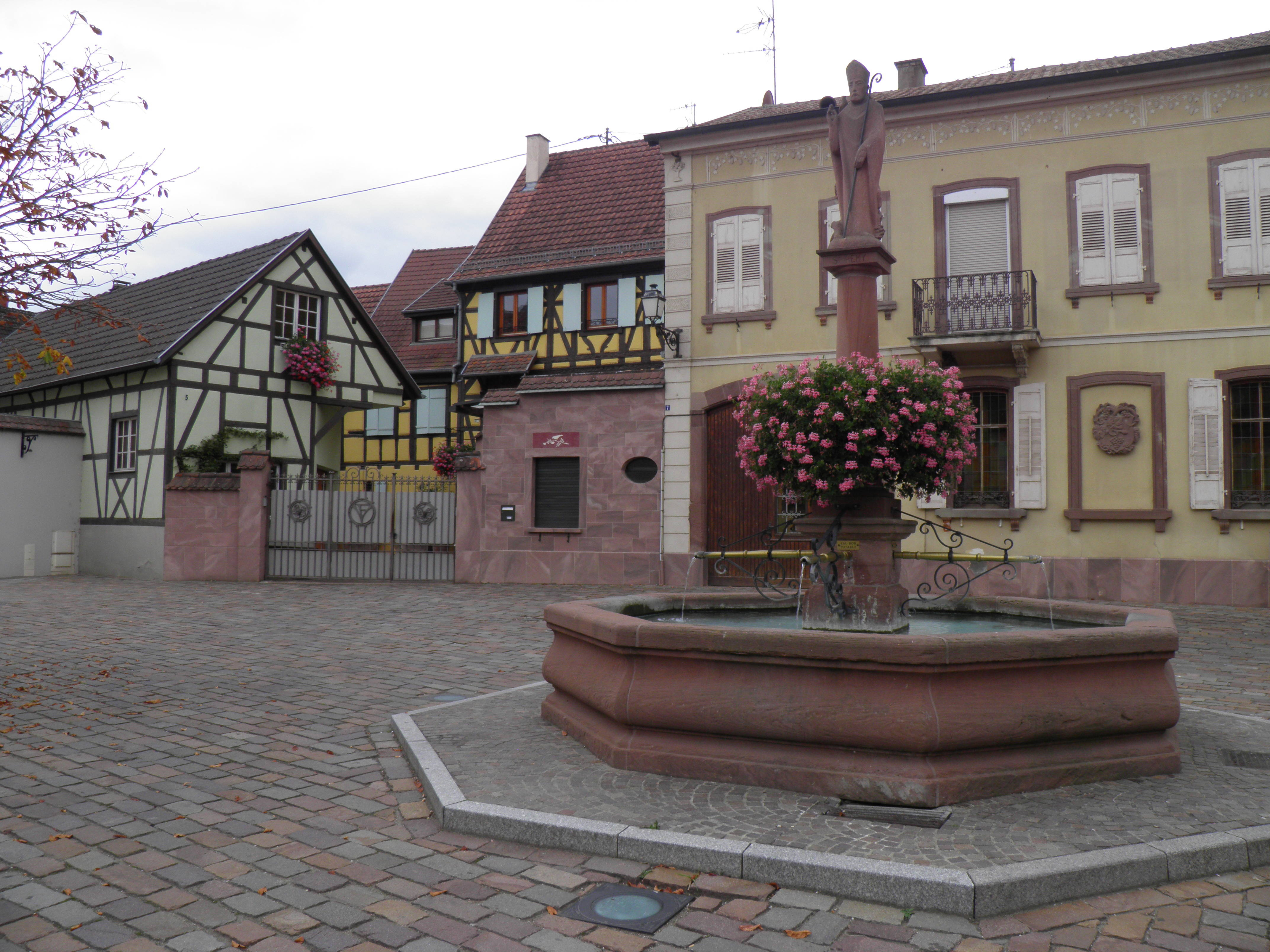 Fontaine à Wettolsheim (Haut-Rhin, France).